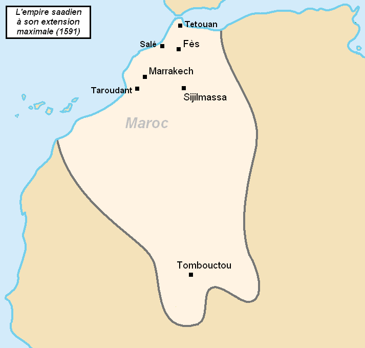 Extension des Saadiens en 1591 Source: "Trade and empire in Africa, 1500-1800", Times Books 2007 sur [1]